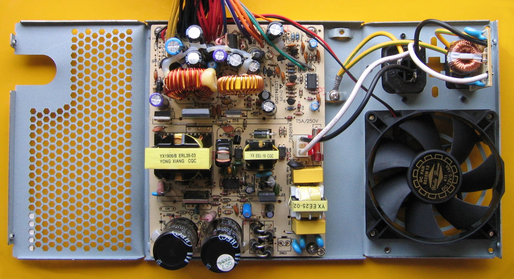 Eintaktflusswandler PC Netzteil 200W (zur Ansicht Kühlkörper entfernt und untere Gehäuseschale aufgefaltet)